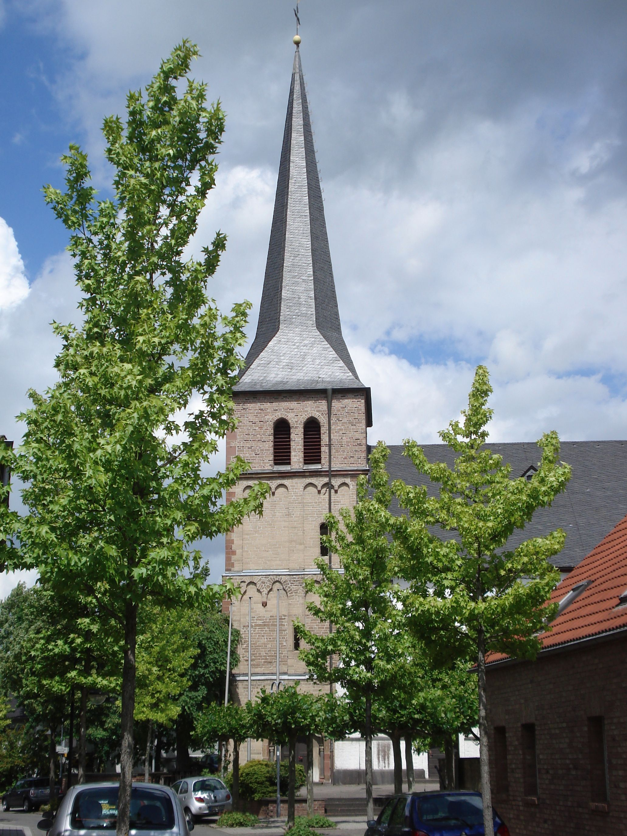 Kirche St.Mariä Geburt Elsdorf This is a photograph of an architectural monument.